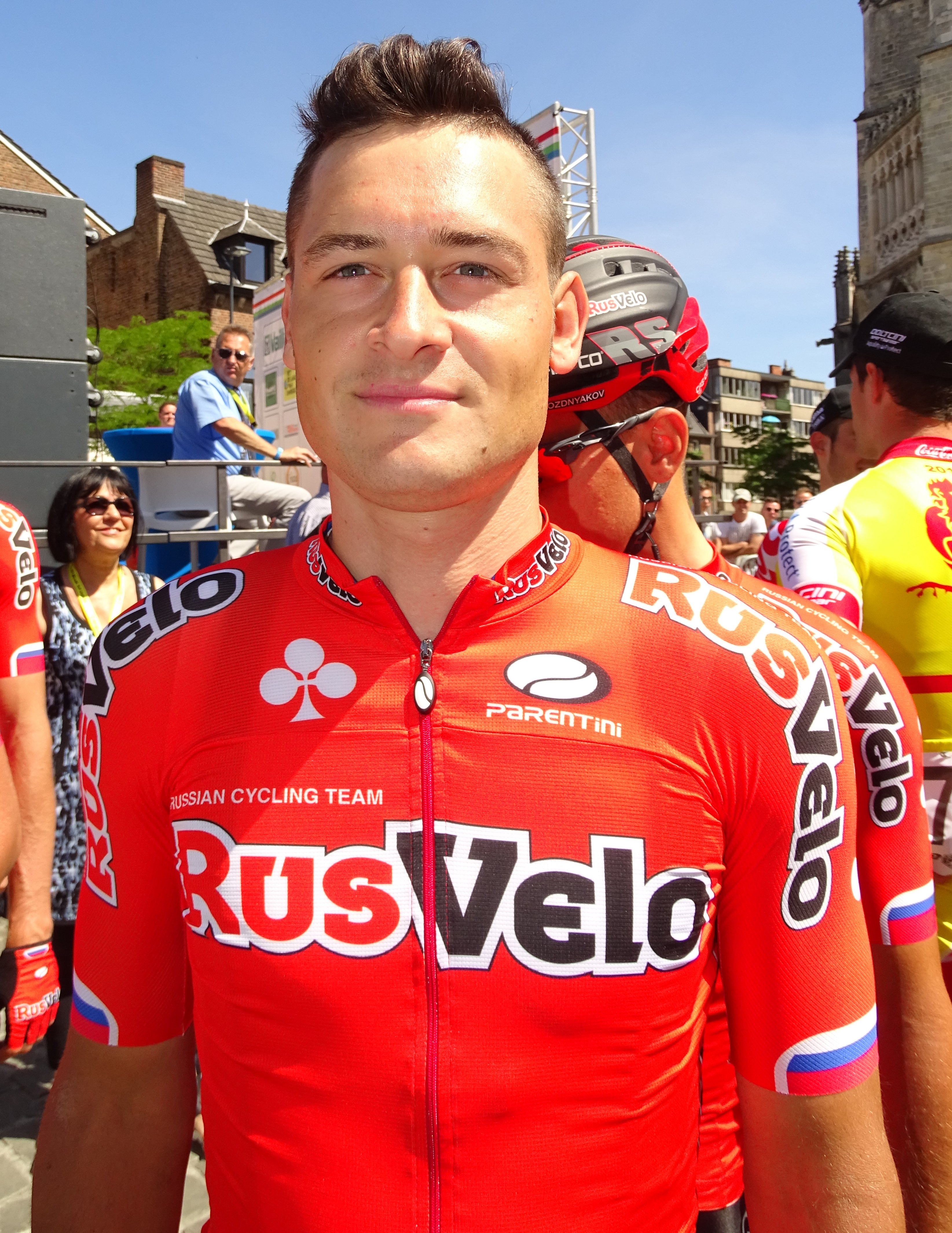 Reportage réalisé le dimanche 14 juin à l'occasion du départ et de l'arrivée du Tour du Limbourg 2015 à Tongres, Belgique.